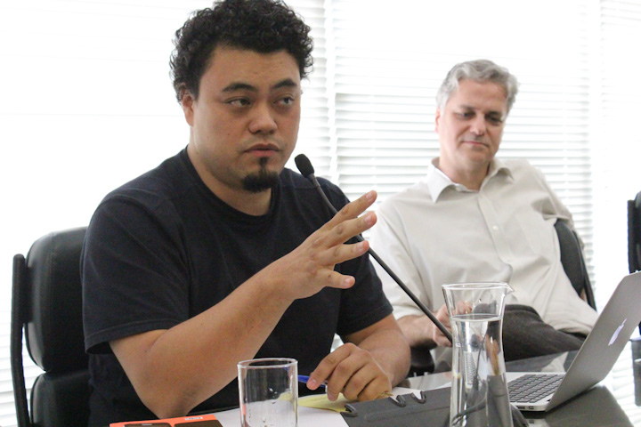 Leonardo Sakamoto, blogueiro do Brasil.